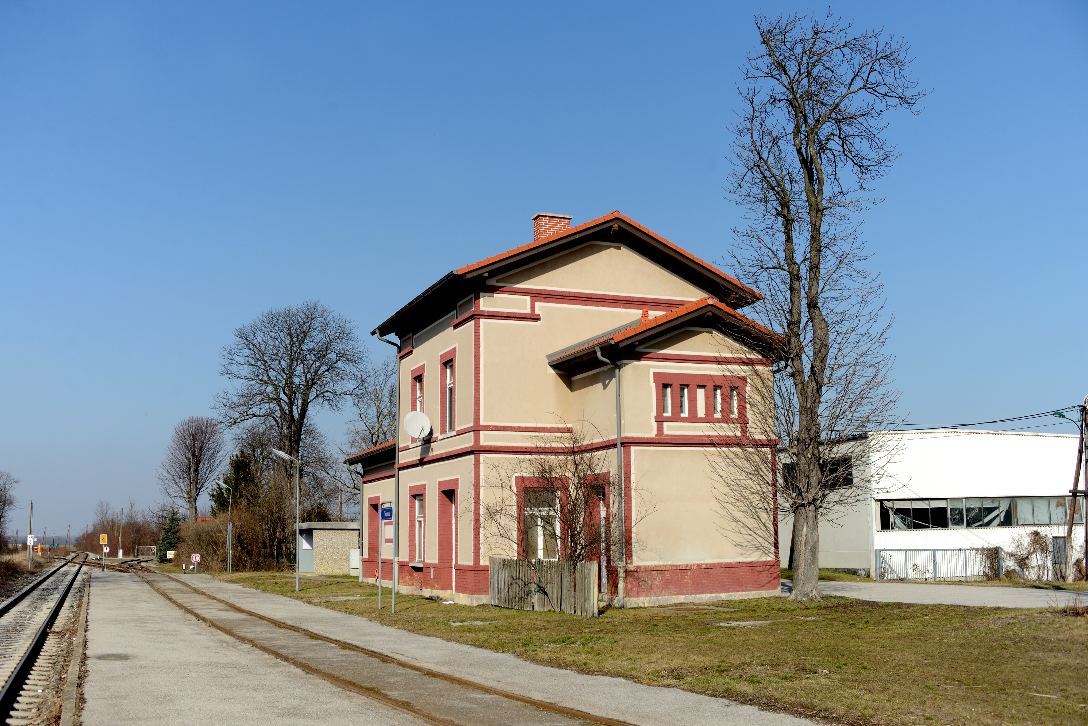 Aufnahmegebäude des Bhf. Trumau.